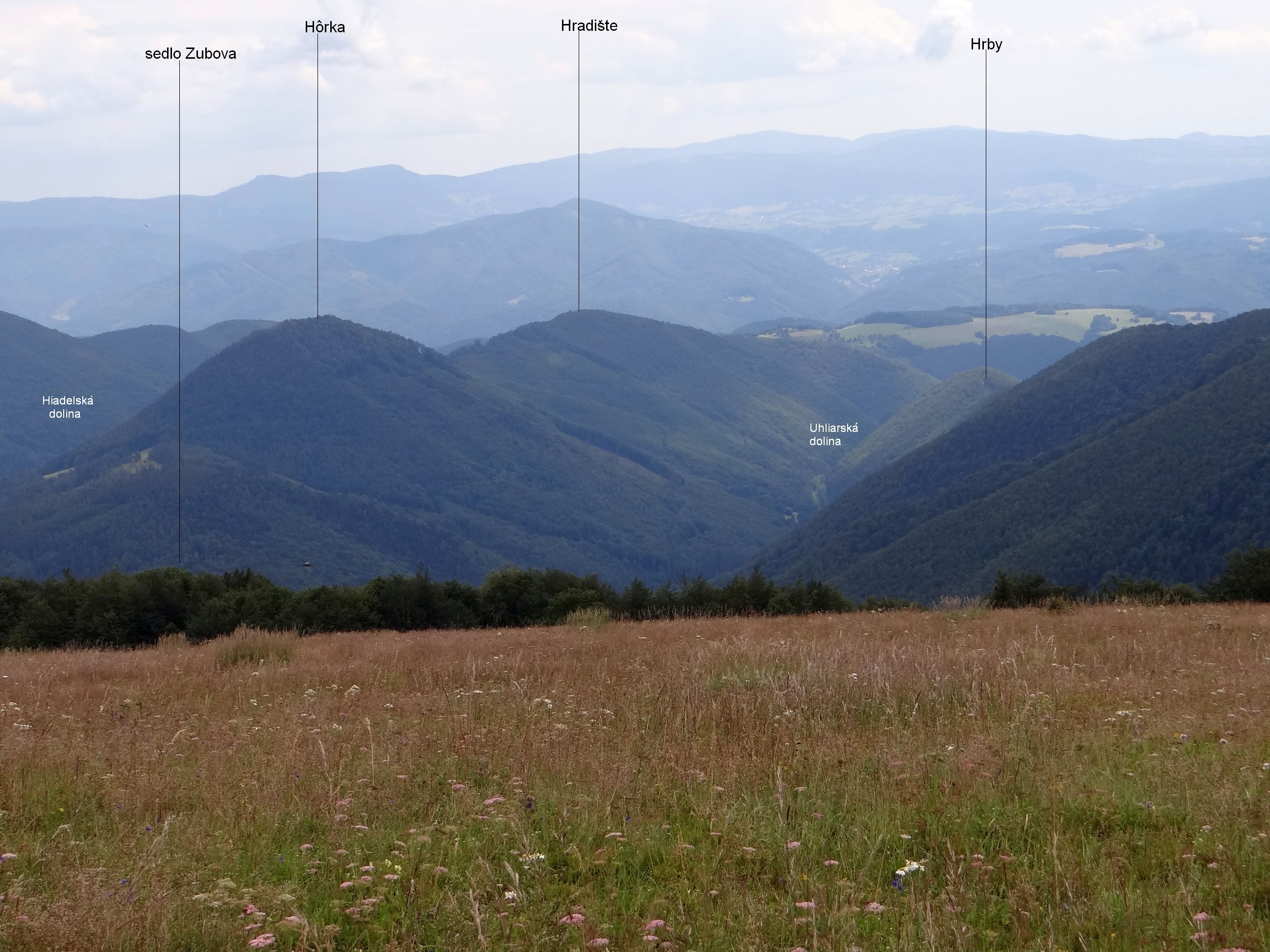 View from Kečka